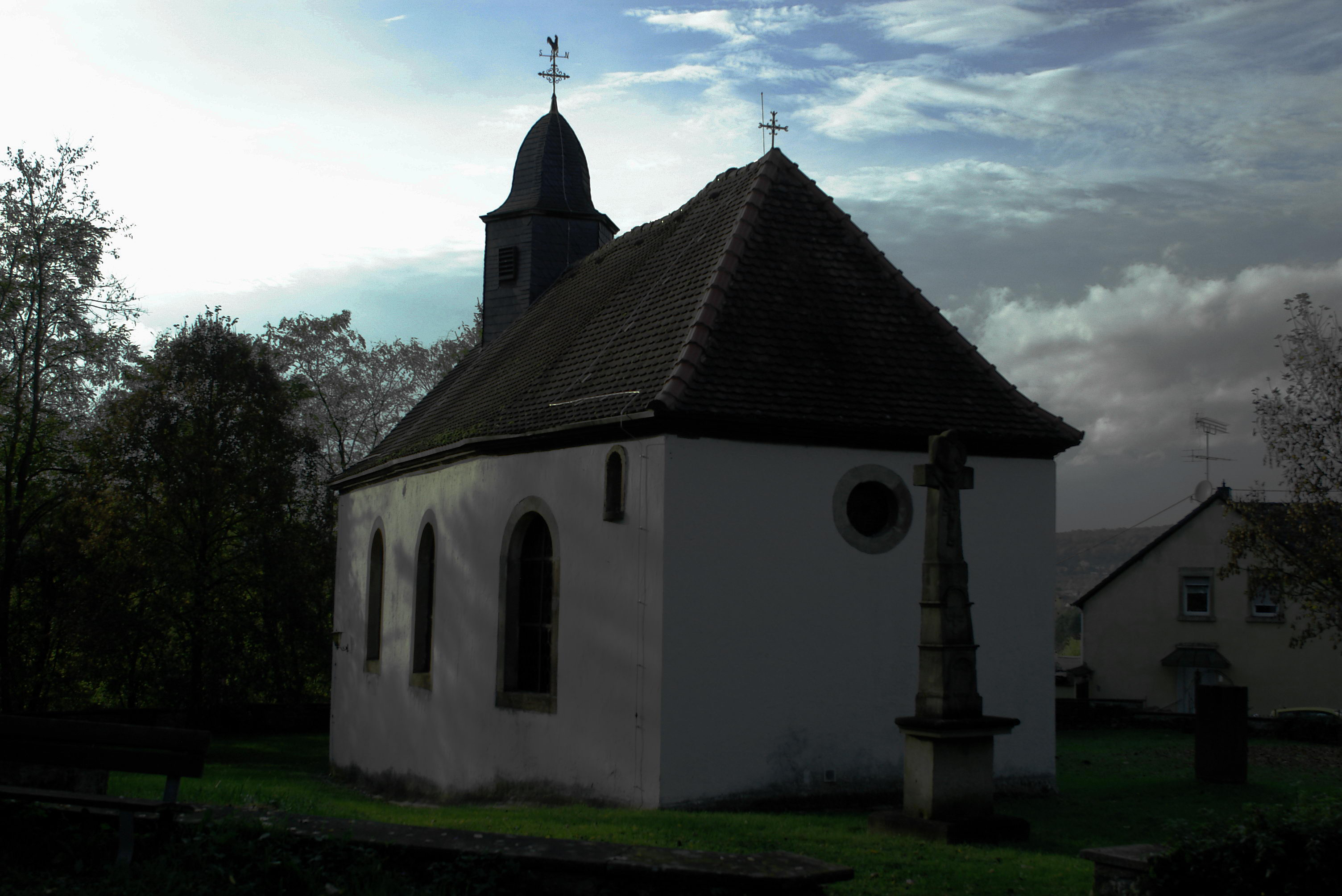 Kuchlinger Kapelle St. Wendalinus und St. Agatha von 1797, Auersmacher